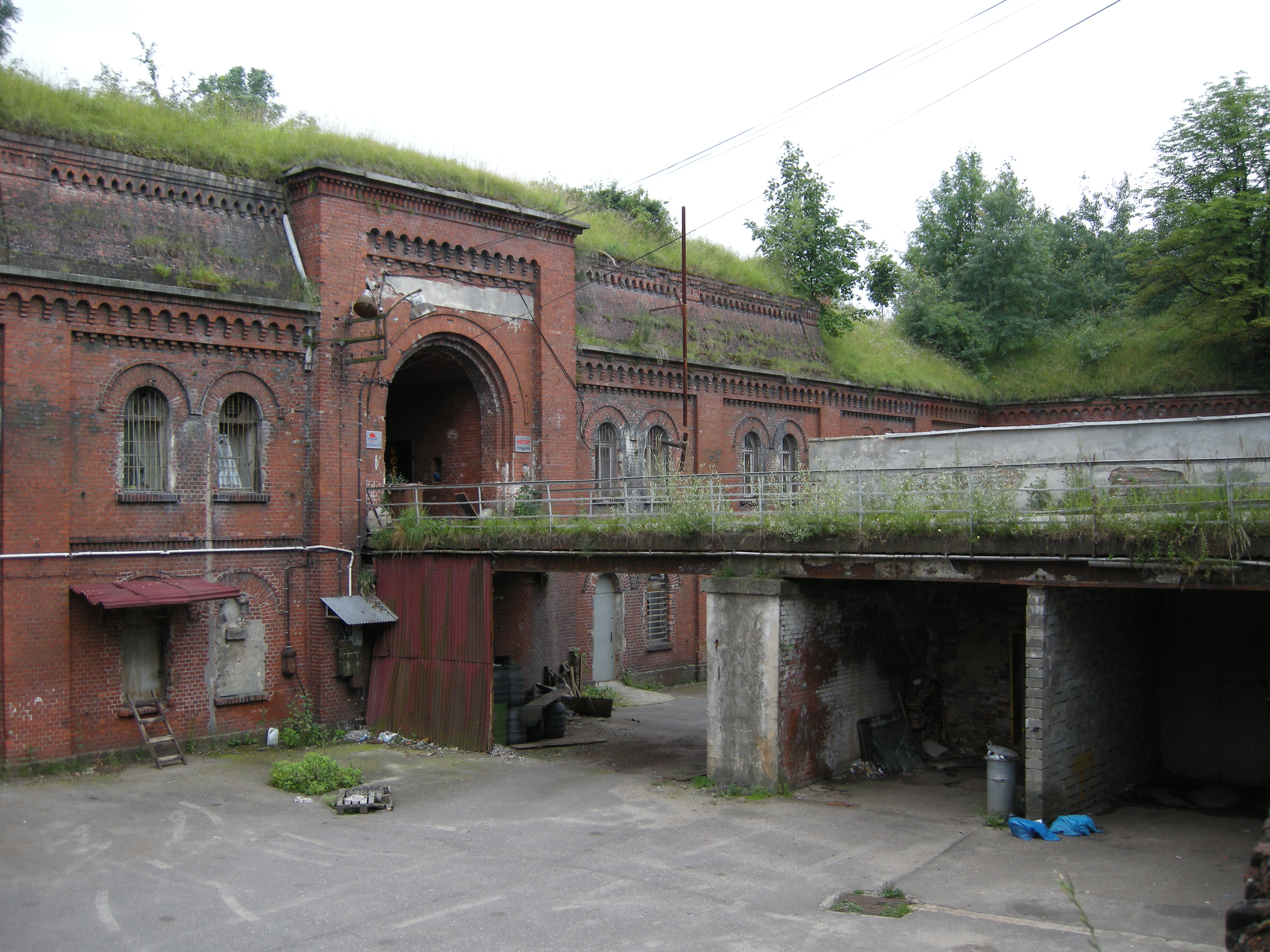 Fort II Twierdzy Poznań